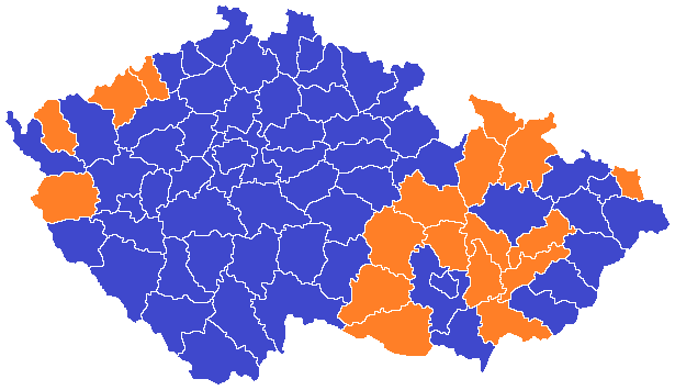 Volby do Evropského parlamentu v roce 2009 - vítězné strany podle okresů (modrá ODS, oranžová ČSSD)